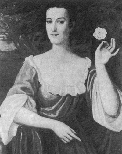 Sally Fairfax (1730-1811), Geliebte George Washington